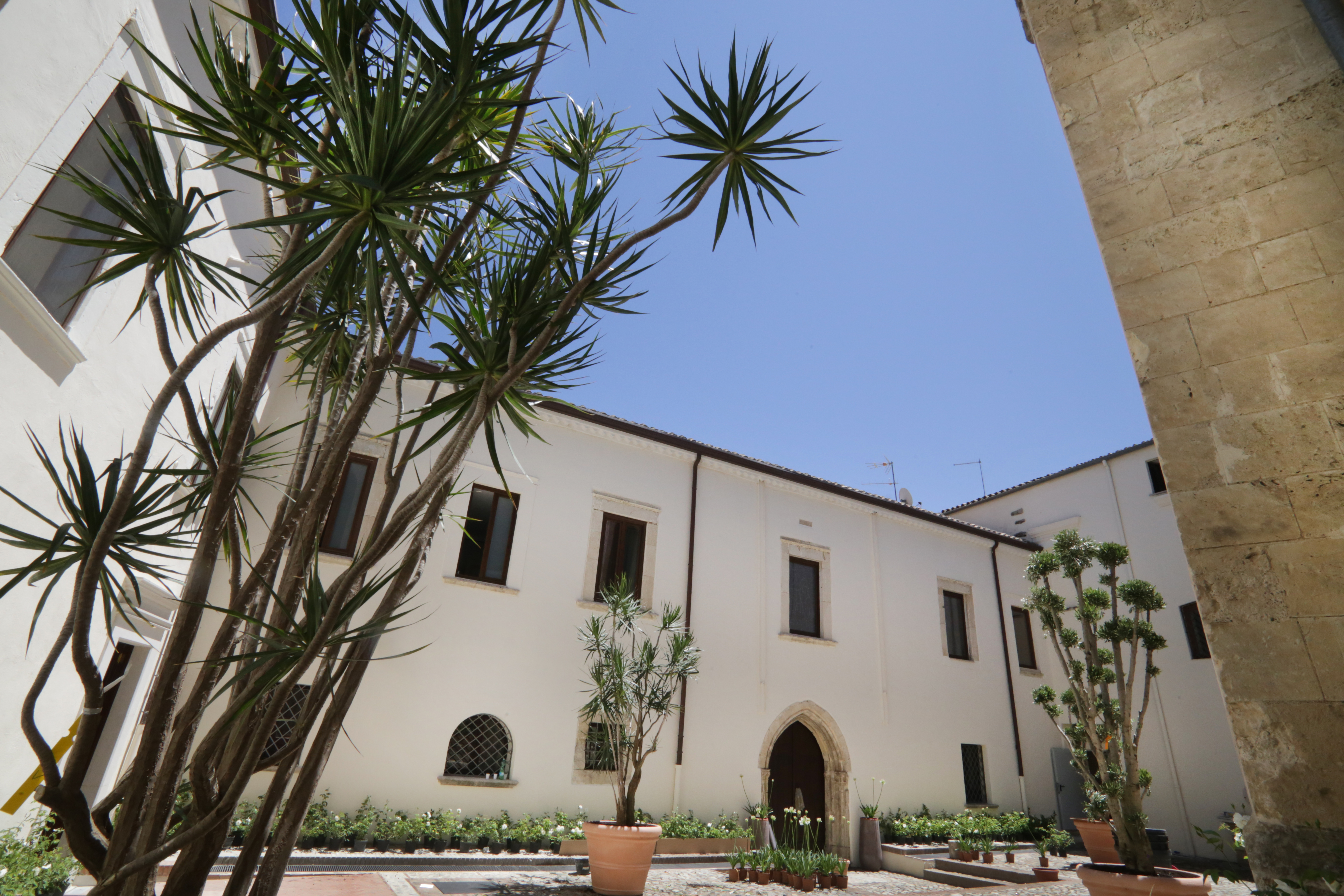 Facciata del Museo Diocesano e del Codex